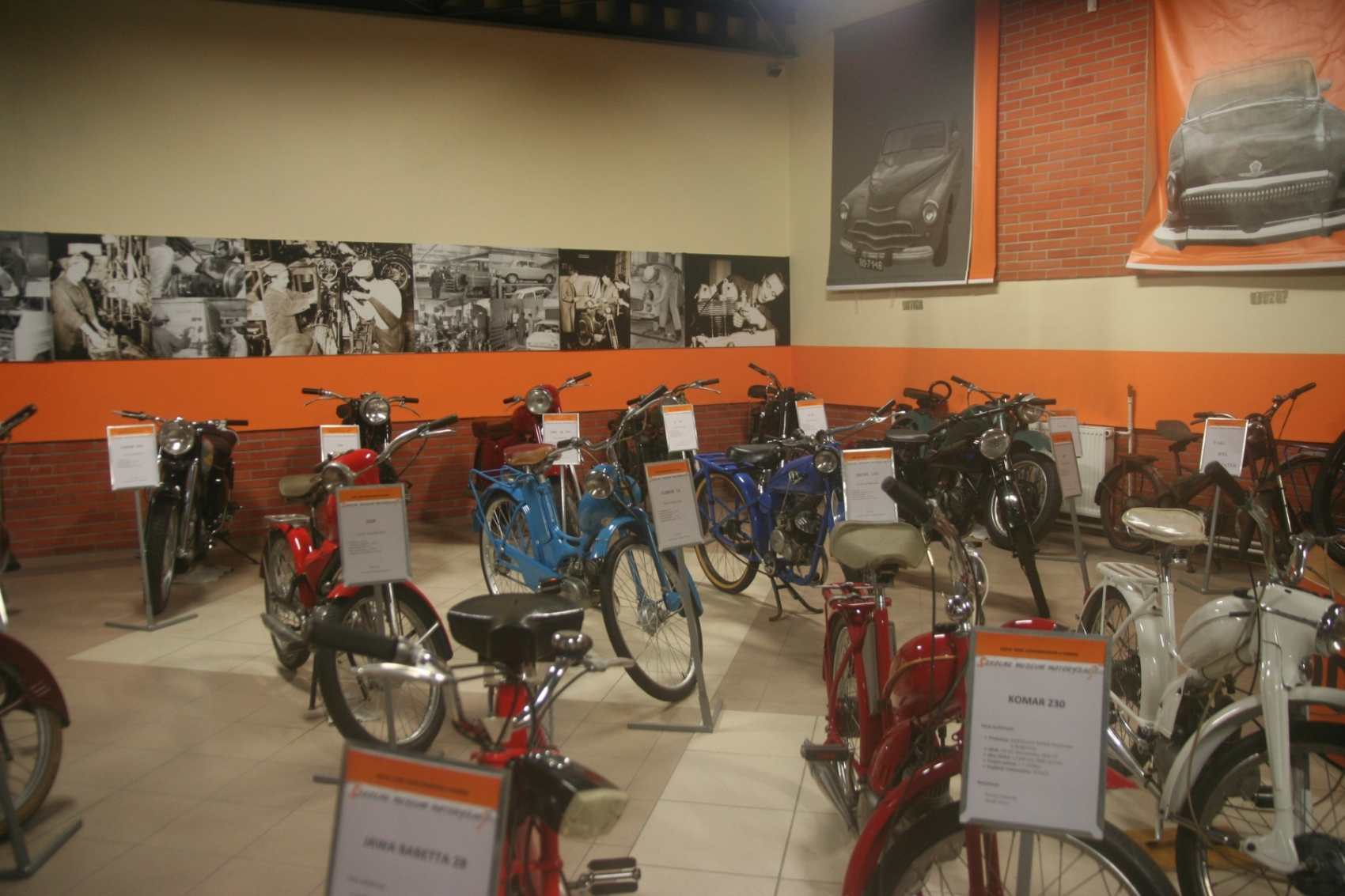 Szkolne Muzeum Motoryzacji w Toruniu, ekspozycja.